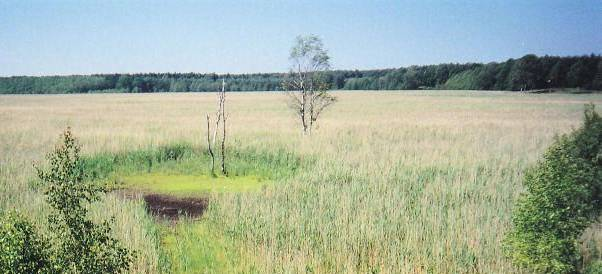 Blick in das Plöwensche Seebruch, ein Naturschutzgebiet in Mecklenburg-Vorpommern.